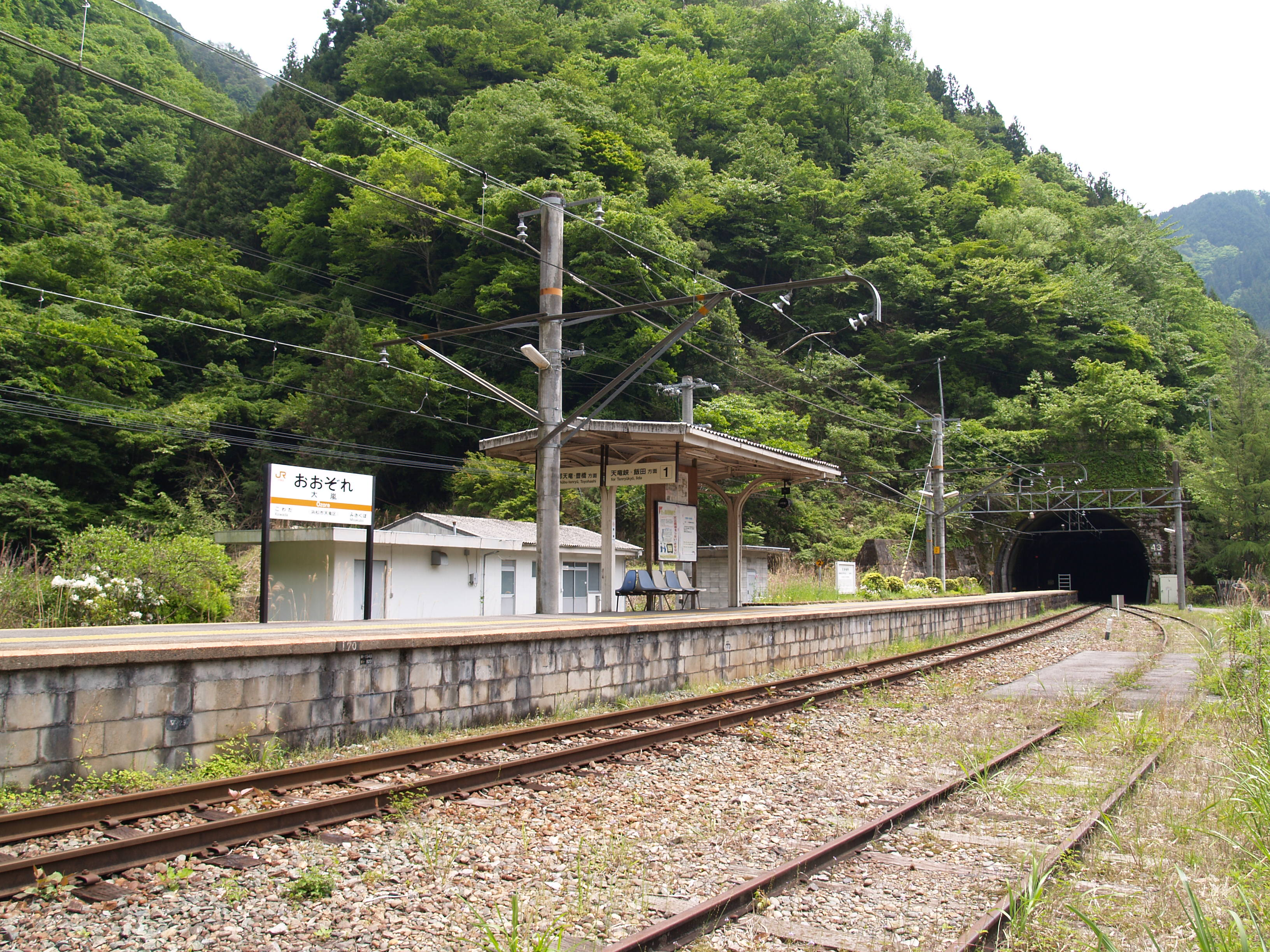 大嵐駅ホーム